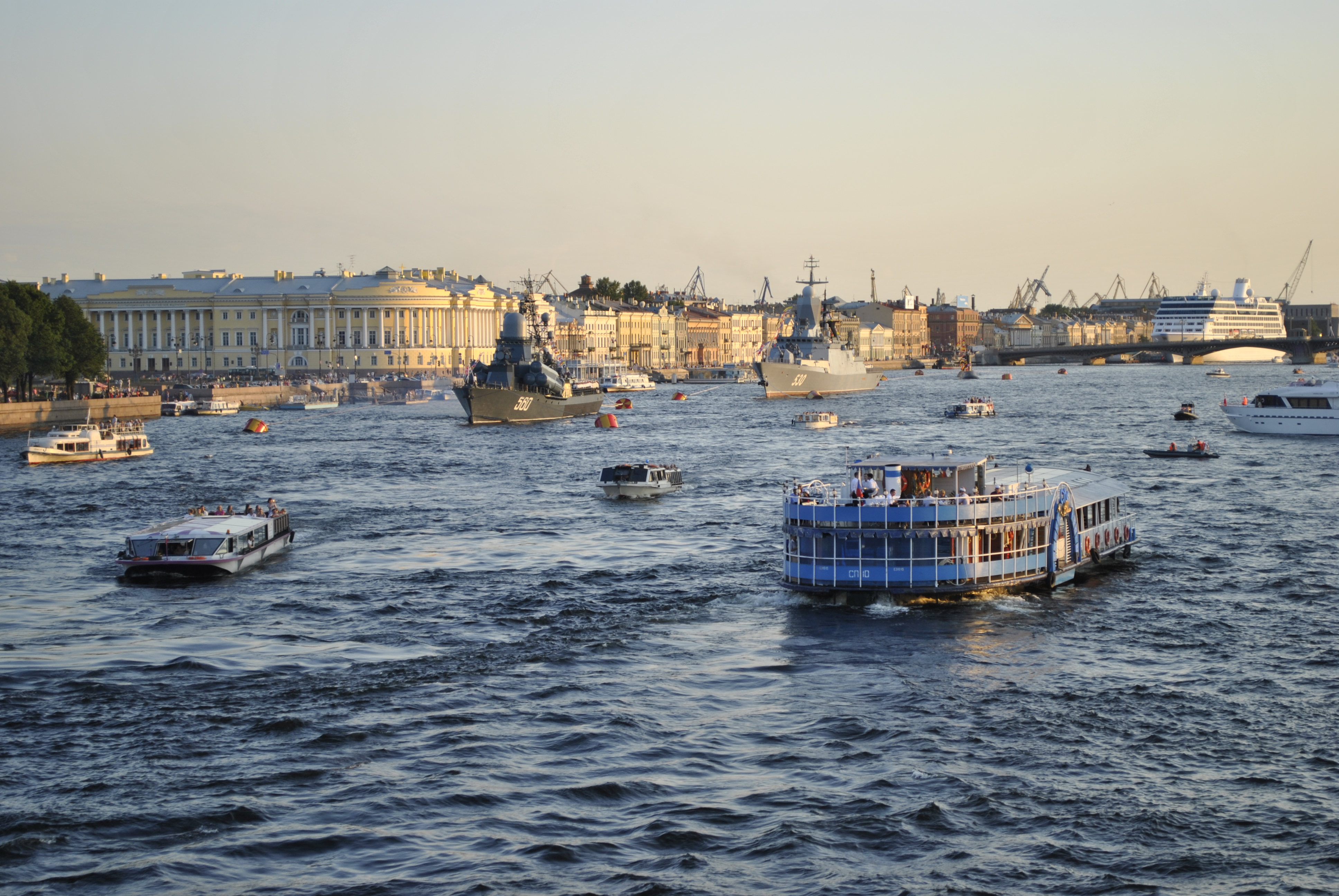 Вид на Неву с Дворцового моста